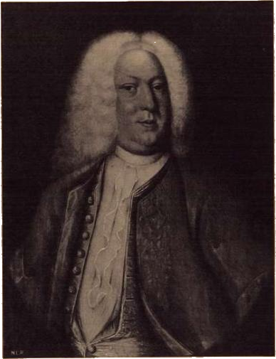 Kjøpmann i Christiania Peter Collett (1694–1740).